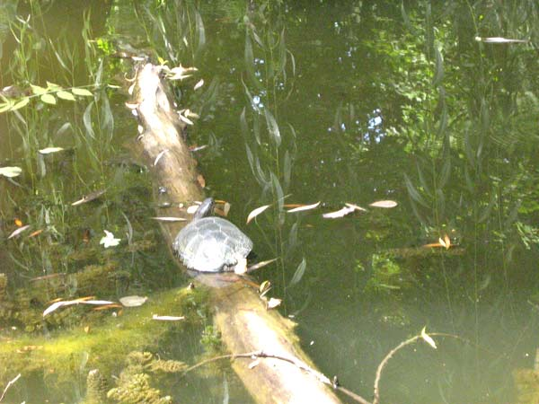 Краснокутський_дендропарк: Краснокутський_дендропарк_ставок